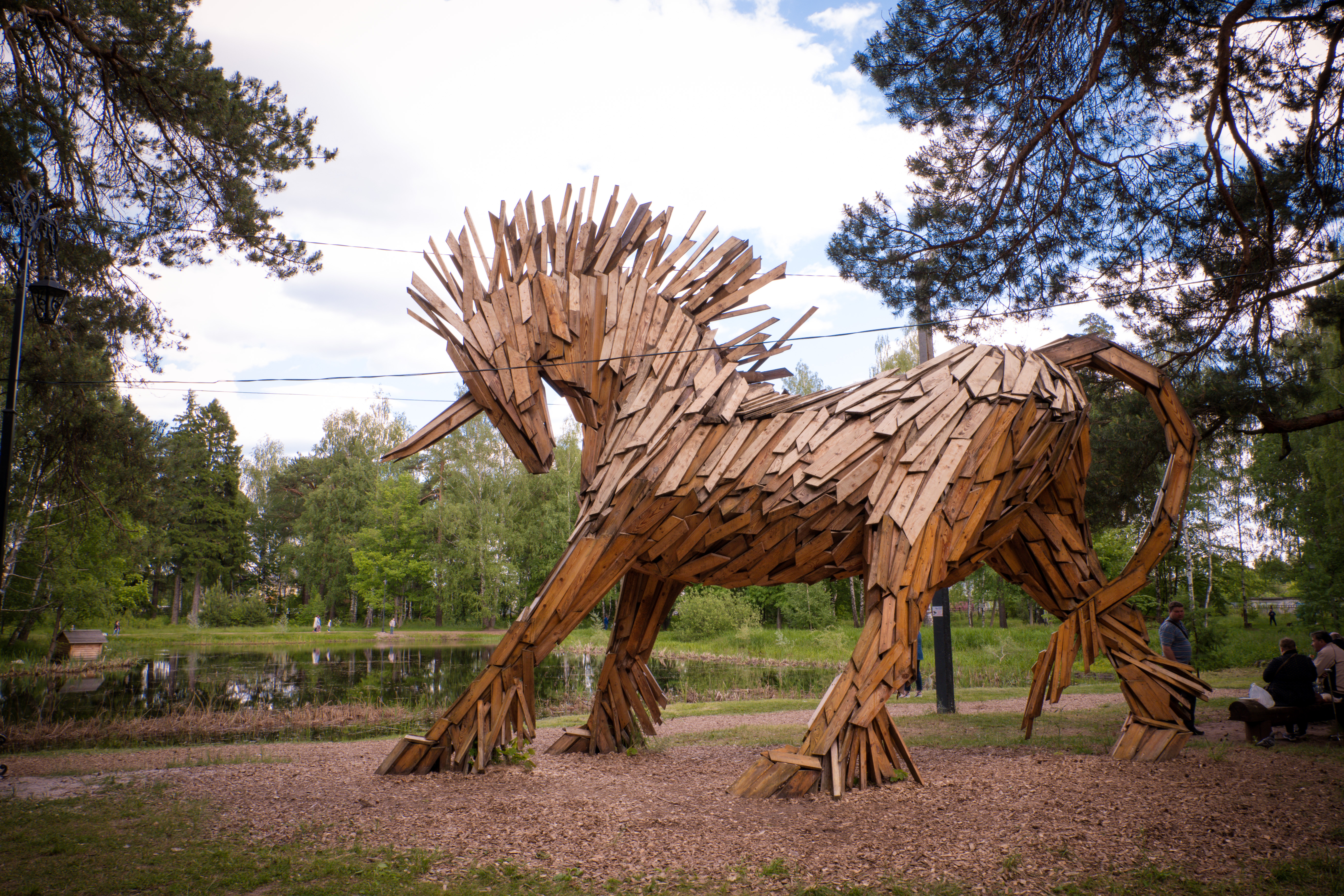 Парк: улица Академика Королева, участок 2, Выкса, Выксунский район, Нижегородская область